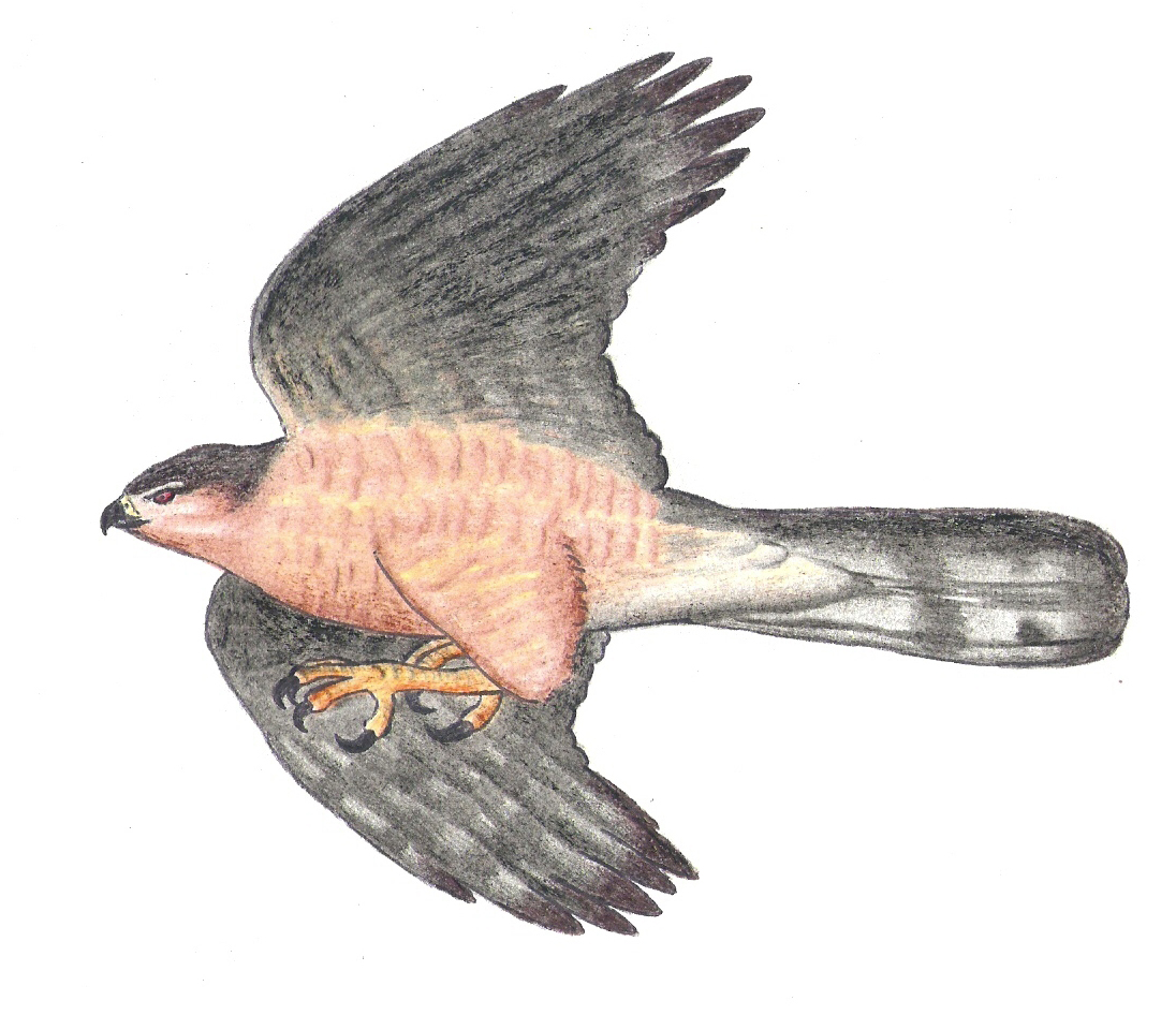 Ave de presa diurna que habita los bosques de Cuba